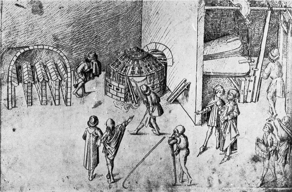 Mittelalterliches Hausbuch von Schloss Wolfegg Fol. 35v: Inneres eines Hüttenwerks mit Röstofen und Abtreibofen mit Blasebälgen, Personal und Besuchern(?)